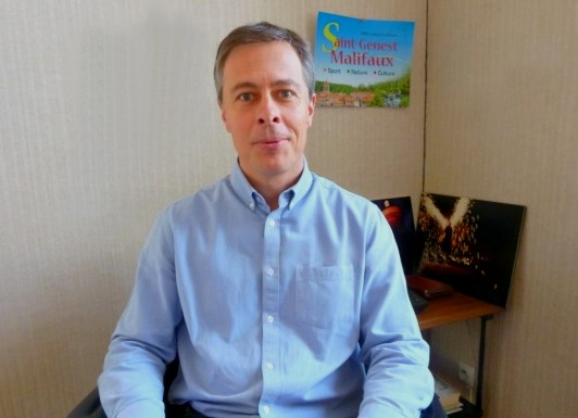 Vincent Ducreux, maire de Saint-Genest Malifaux depuis 2014.